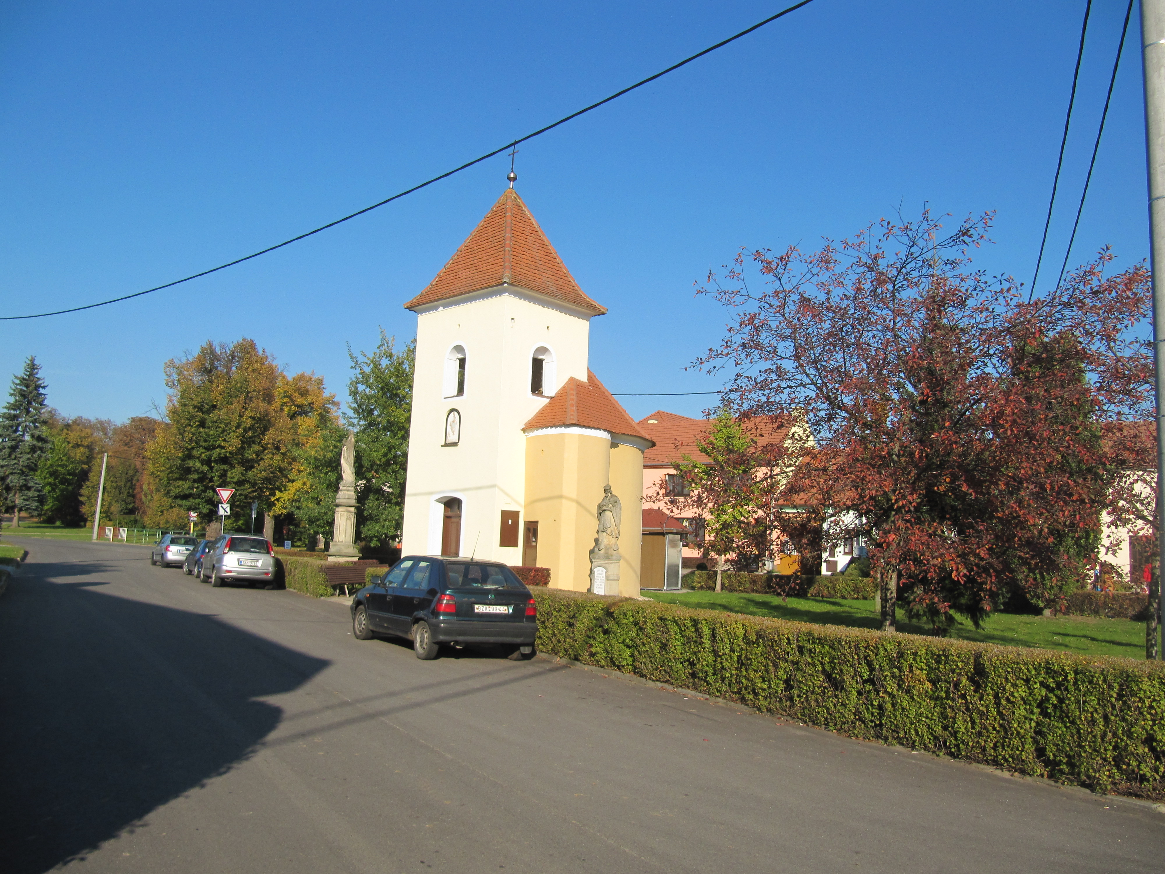 Kozlany (VY), náves